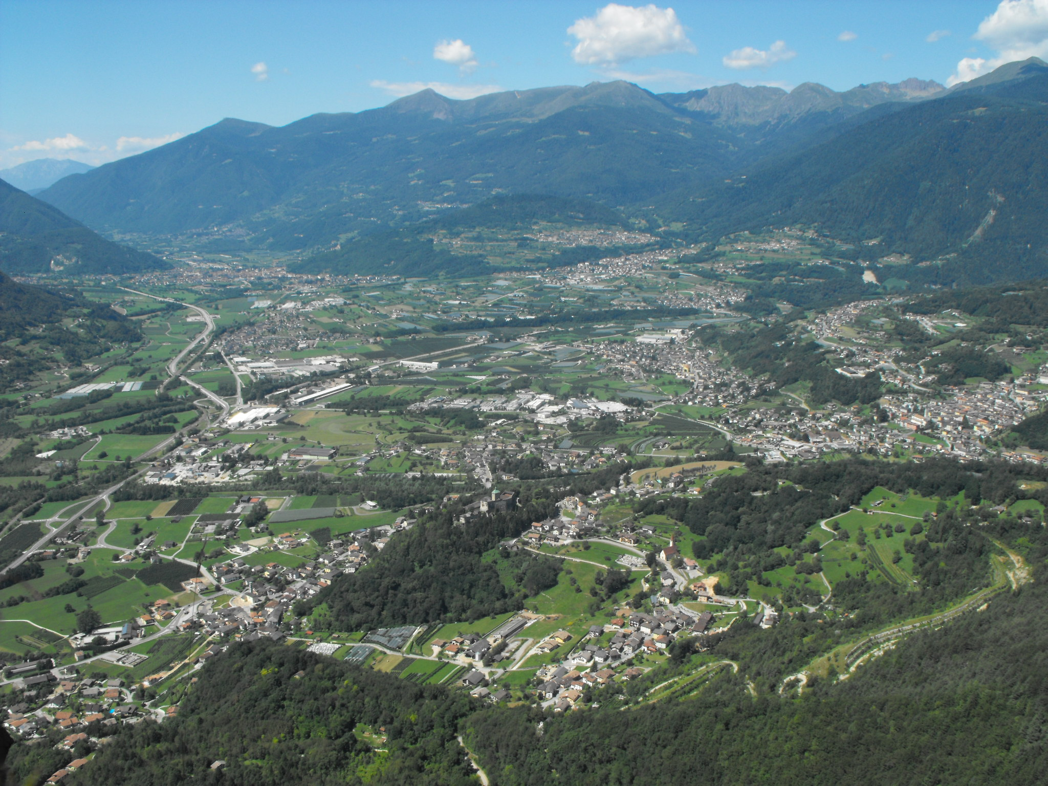 VIsta della Valsugana in direzione ovest dal Monte Lefre